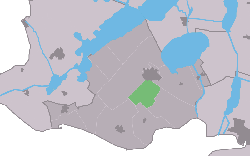 Kaartsje fan himrik fan Rûgehuzen